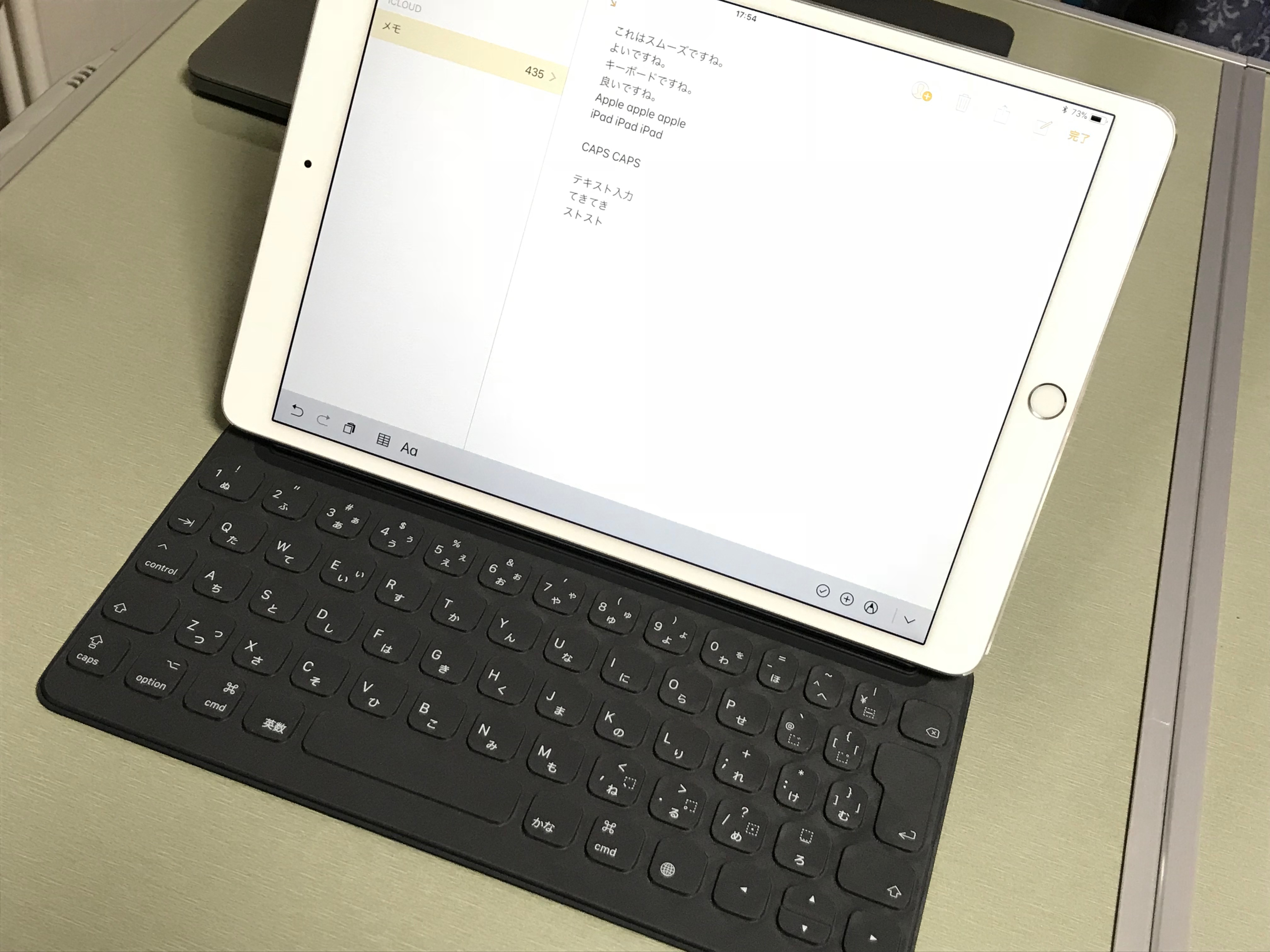 iPad Pro 10.5 unboxing 2018.1.5